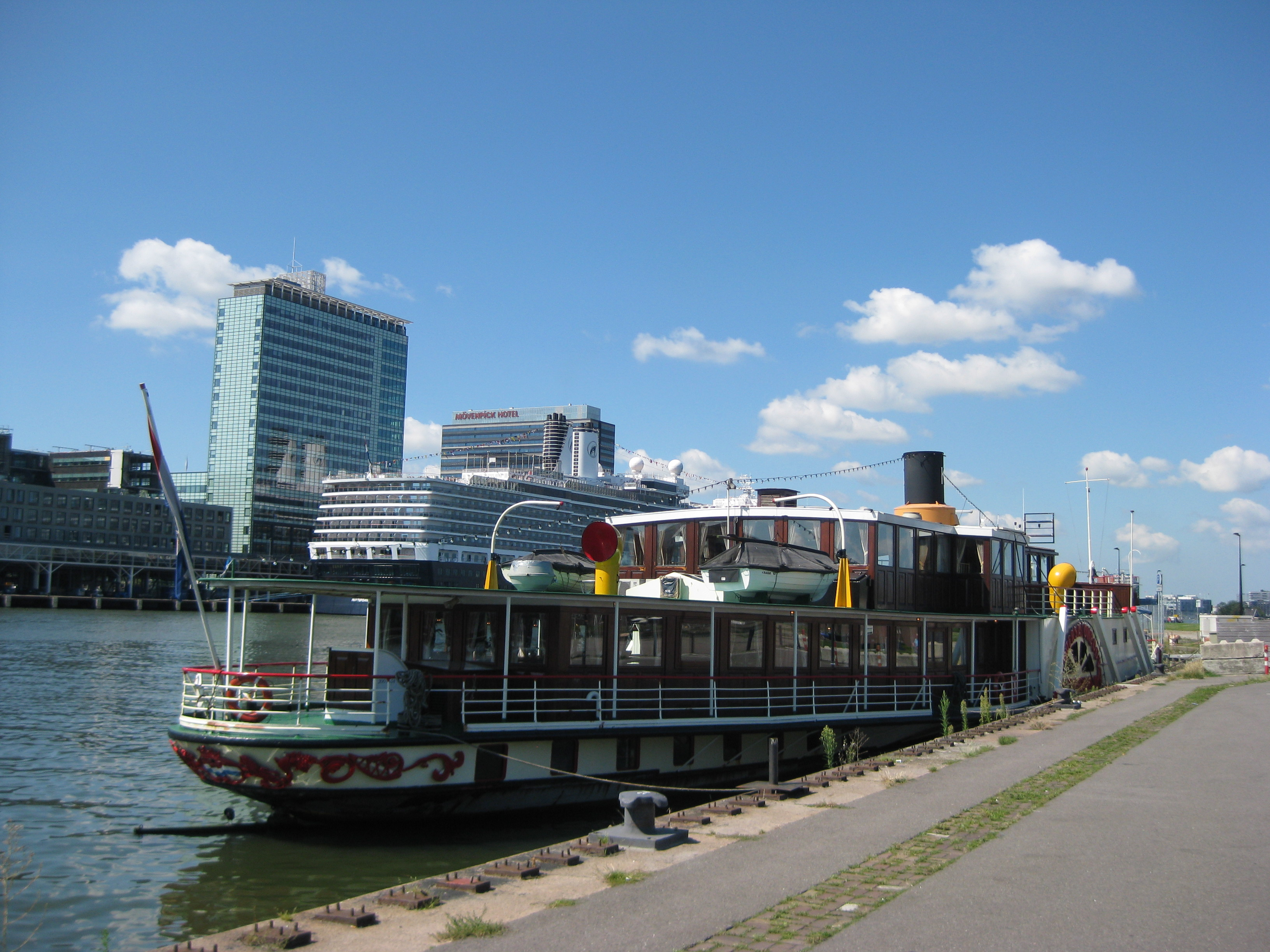 Partyschip Kapitein Kok bij het Java-eiland Amsterdam. Op de achtergrond PTA